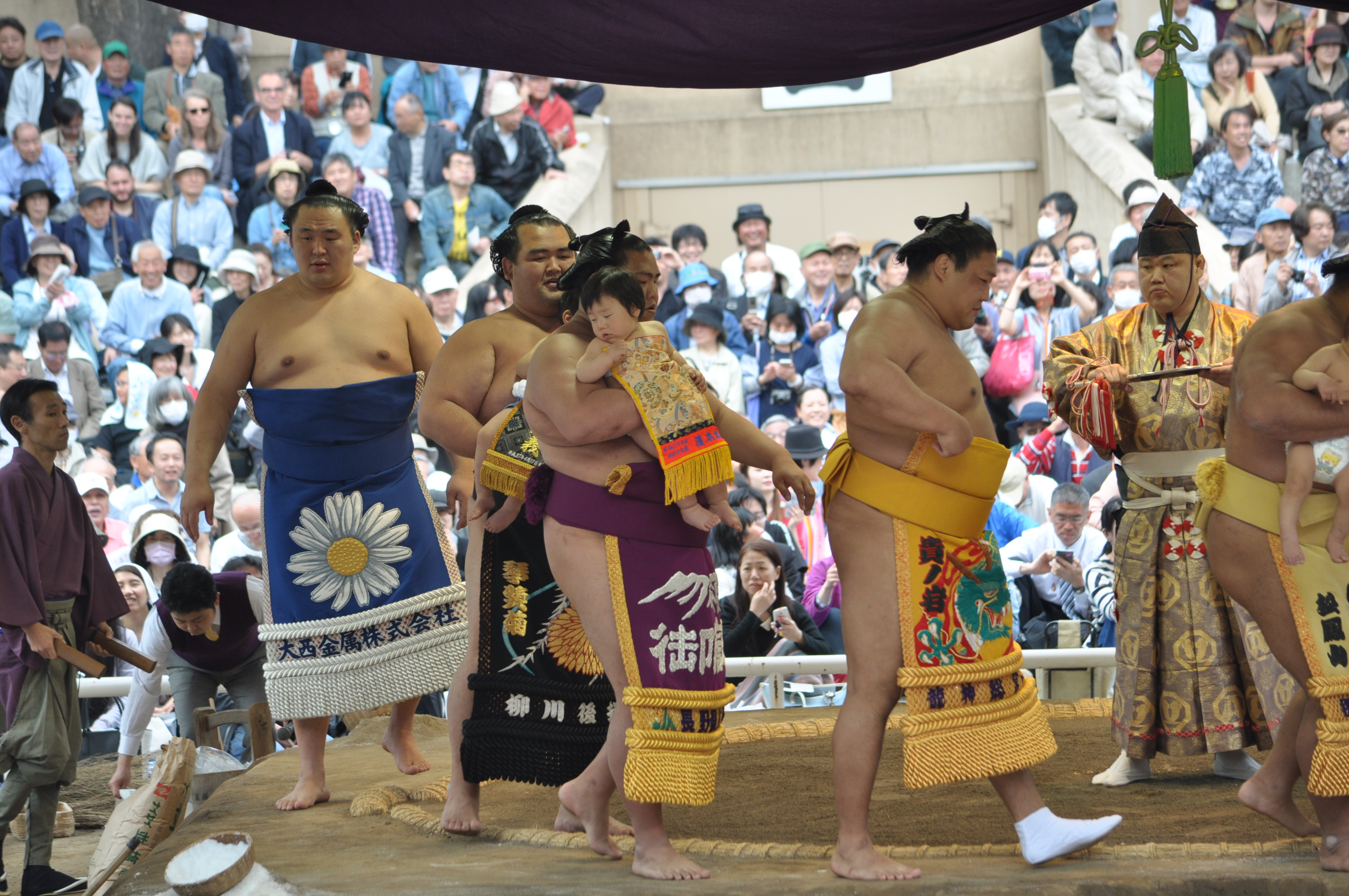 玉鷲 一朗